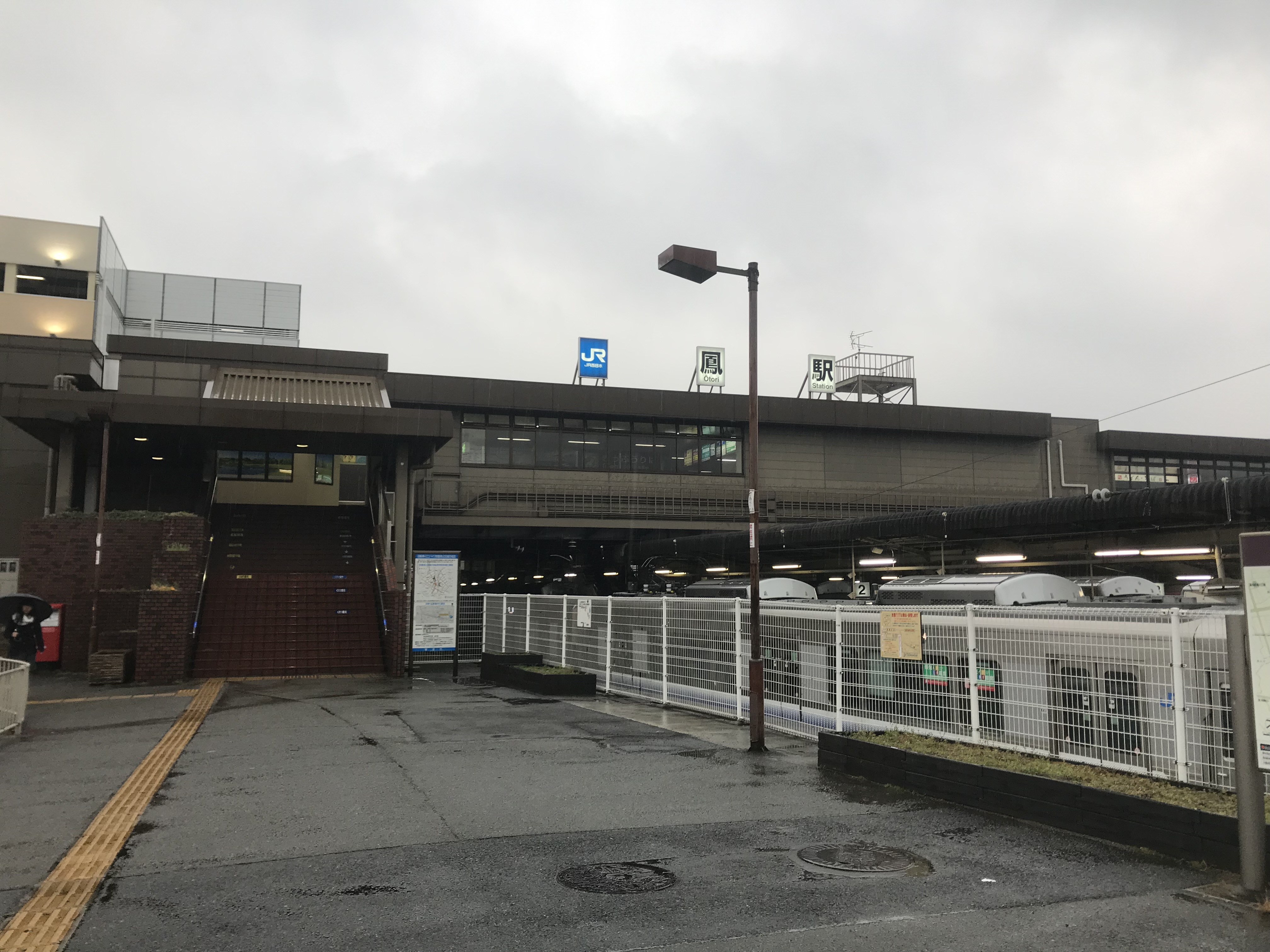 鳳駅の駅舎